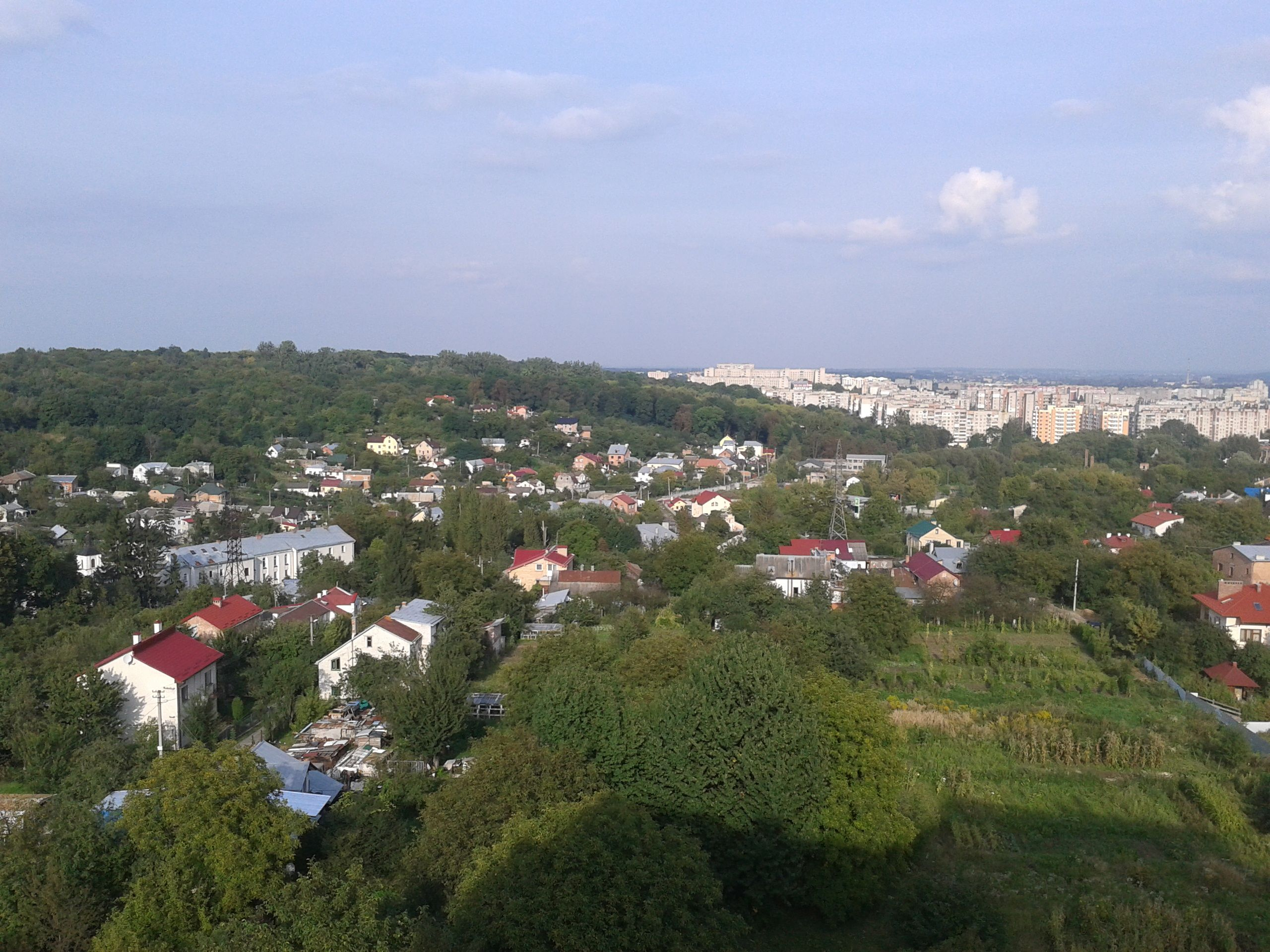 Львів, місцевість Голоско